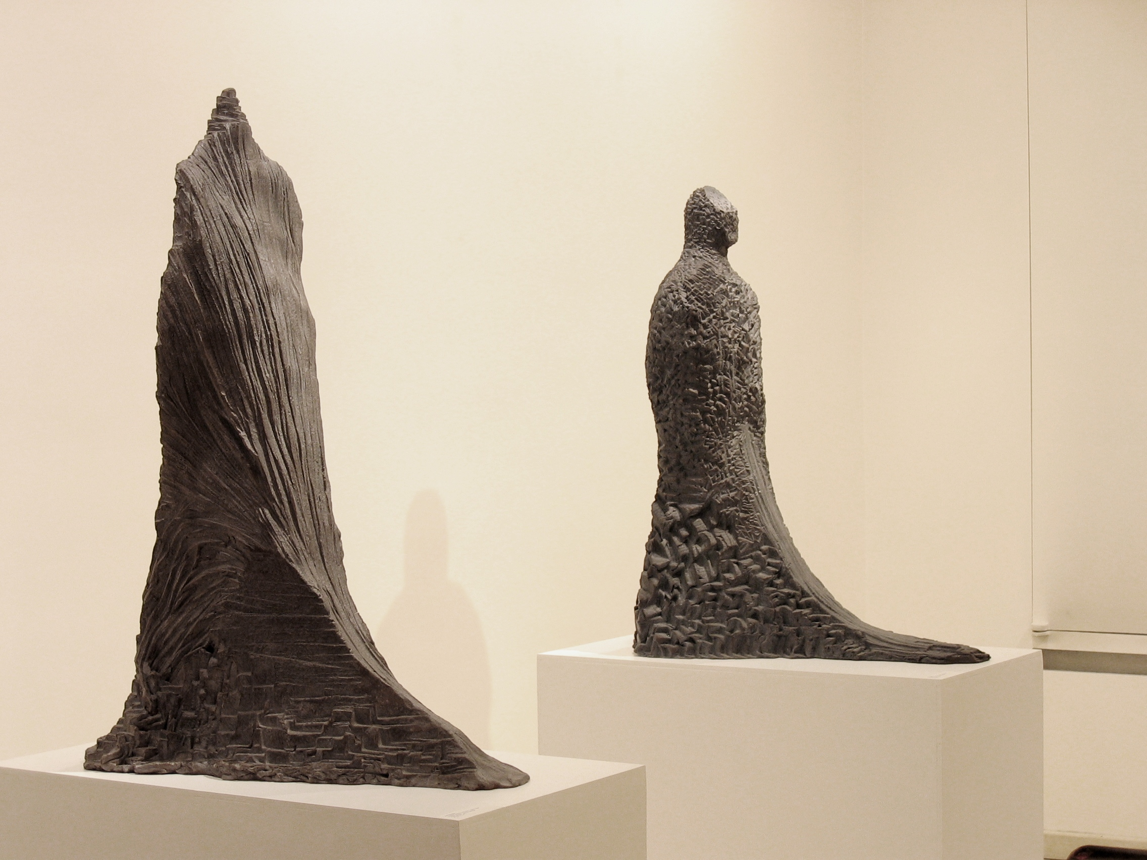 Vue exposition "terre d'appui", 2006, galerie Marwan Hoss.